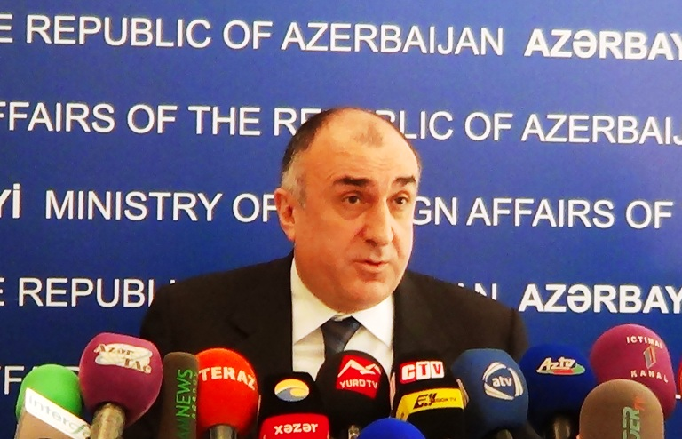 Azərbaycan Xarici işlər naziri Elmar Məmmədyarov